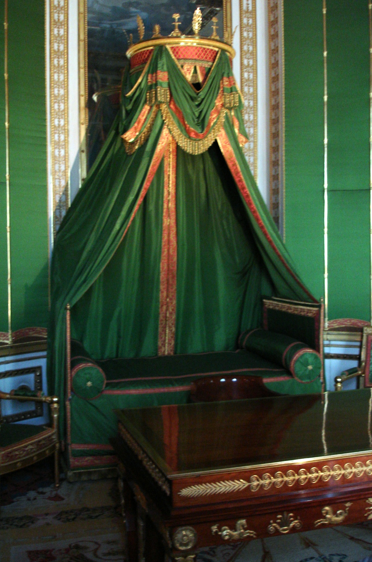 Lit de travers d'époque Empire, chambre à coucher de l'empéreur Napoléon Ier, Château de Fontainebleau, France. own work